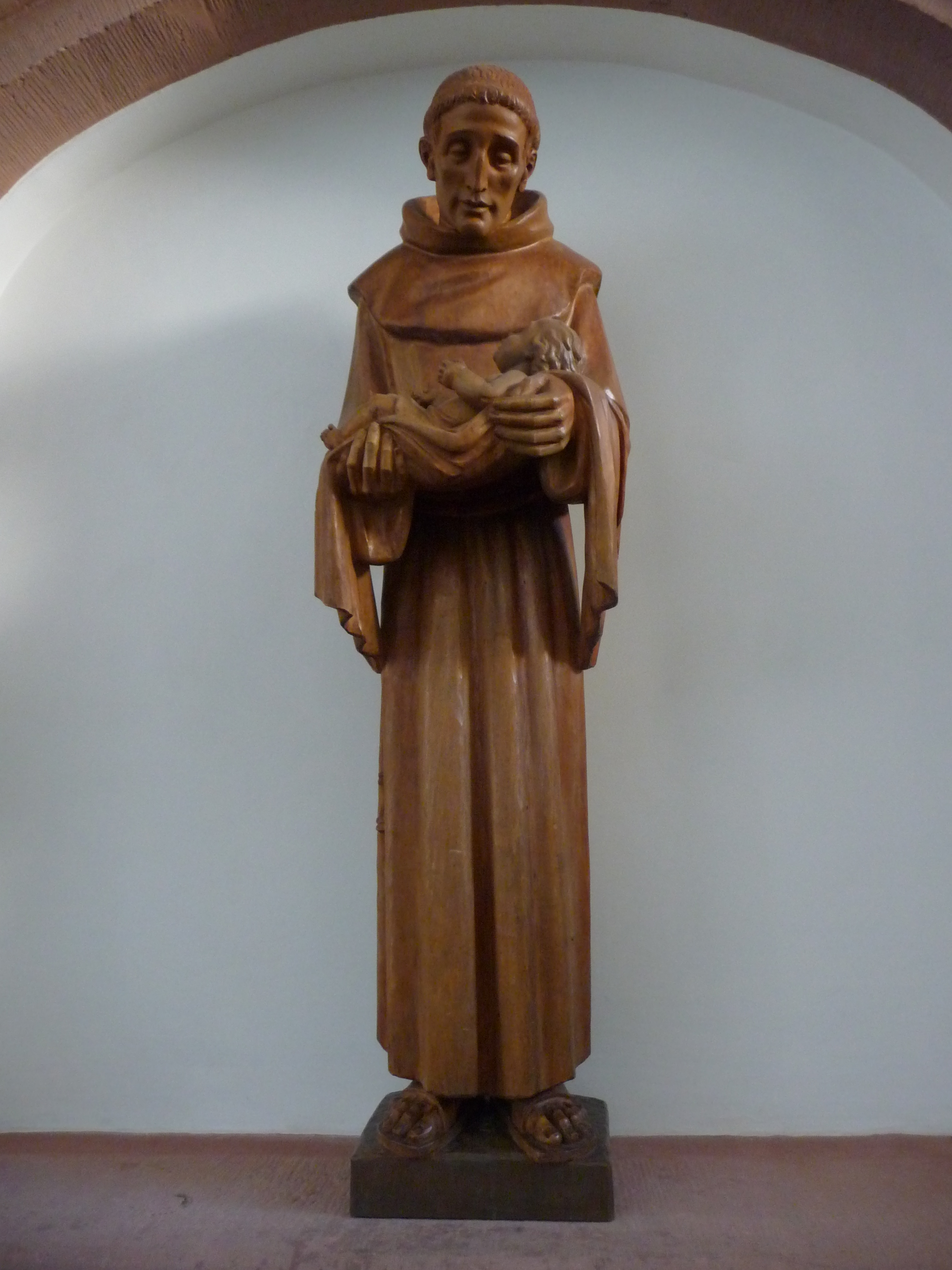 Skulptur des Heiligen Antonius in der katholischen Kirche St. Anna in Heidelberg (Baden-Württemberg, Deutschland)